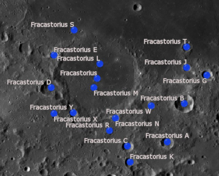 Cráter lunar Fracastorius. Cráteres satélite. (Imagen LRO)